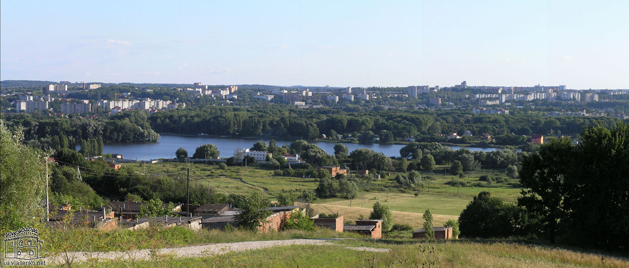 Панорама Хмельницького